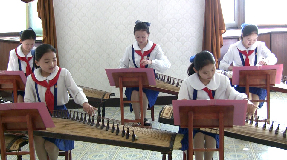 Mangyondae Schoolchildrens Palace in Pyongyang